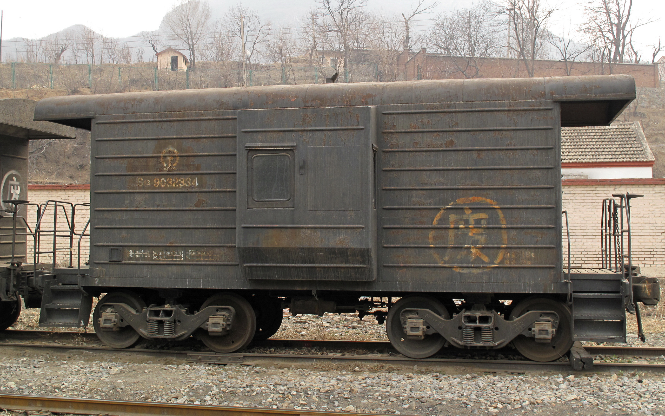 废弃的S13型守车存放在门头沟至大台铁路落坡岭站